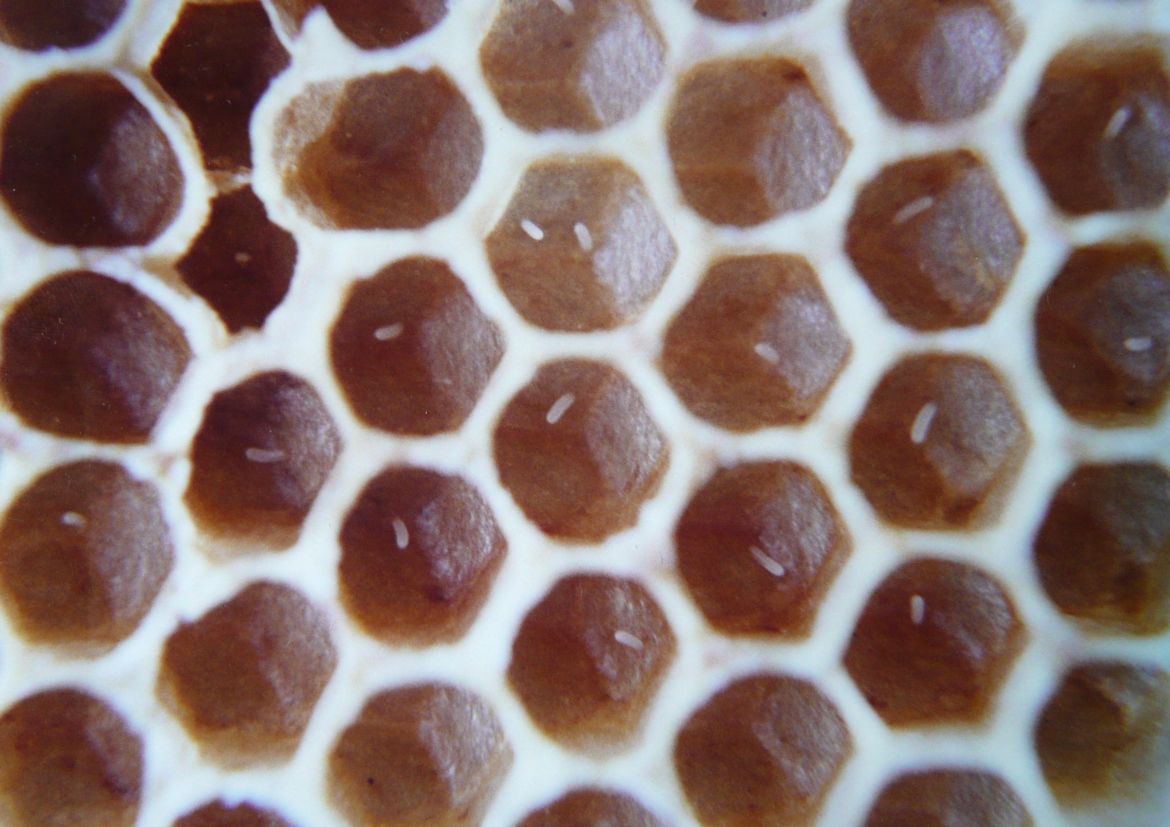 Brutwabe eines drohnenbrütigen Bienenvolkes. Die Eier befinden sich – im Gegensatz zu einem Volk, in dem sich eine richtige Bienenkönigin befindet − nicht in der Mitte des Zellenbodens. Auch eine mehrfach "bestiftete" Zelle ist zu sehen.